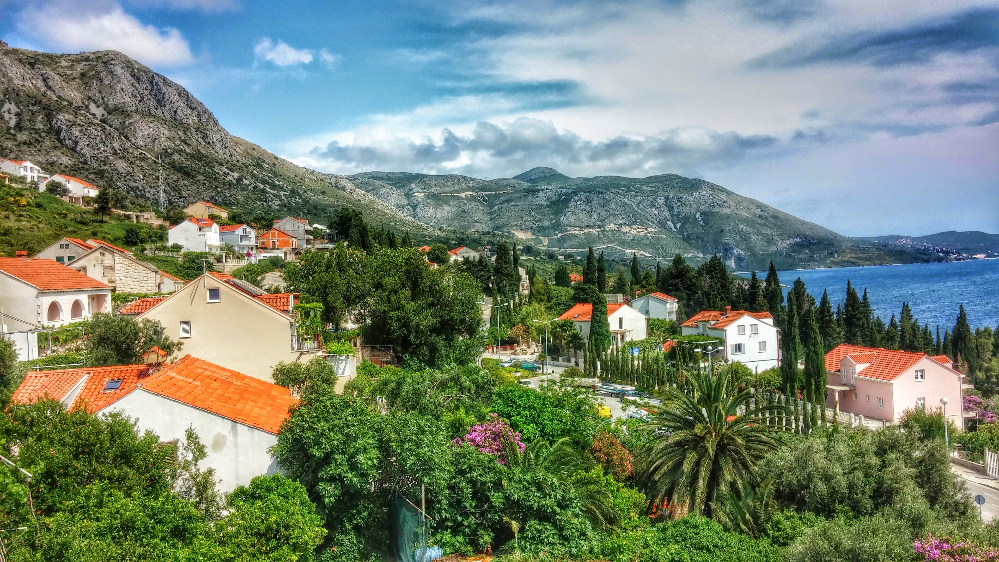 Mlini